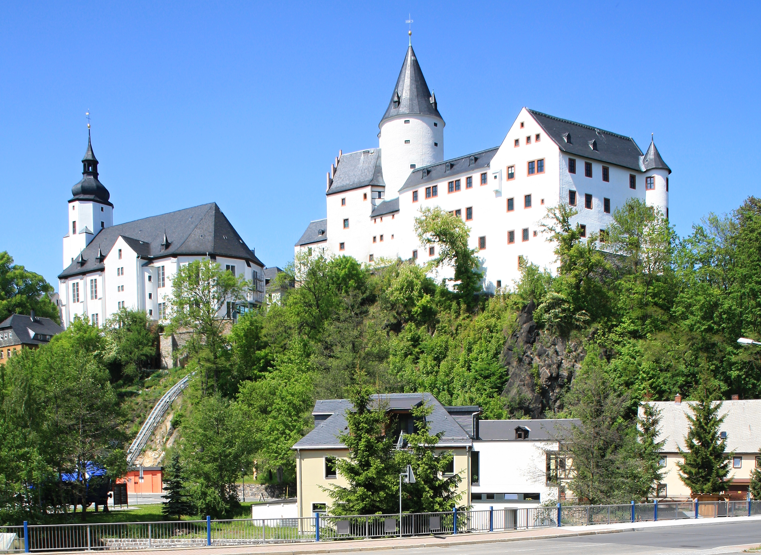 Schloss Schwarzenberg. Sachsen.